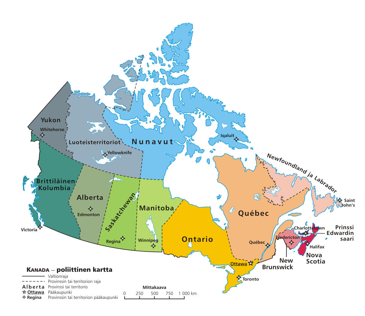 Kanada – poliittinen kartta